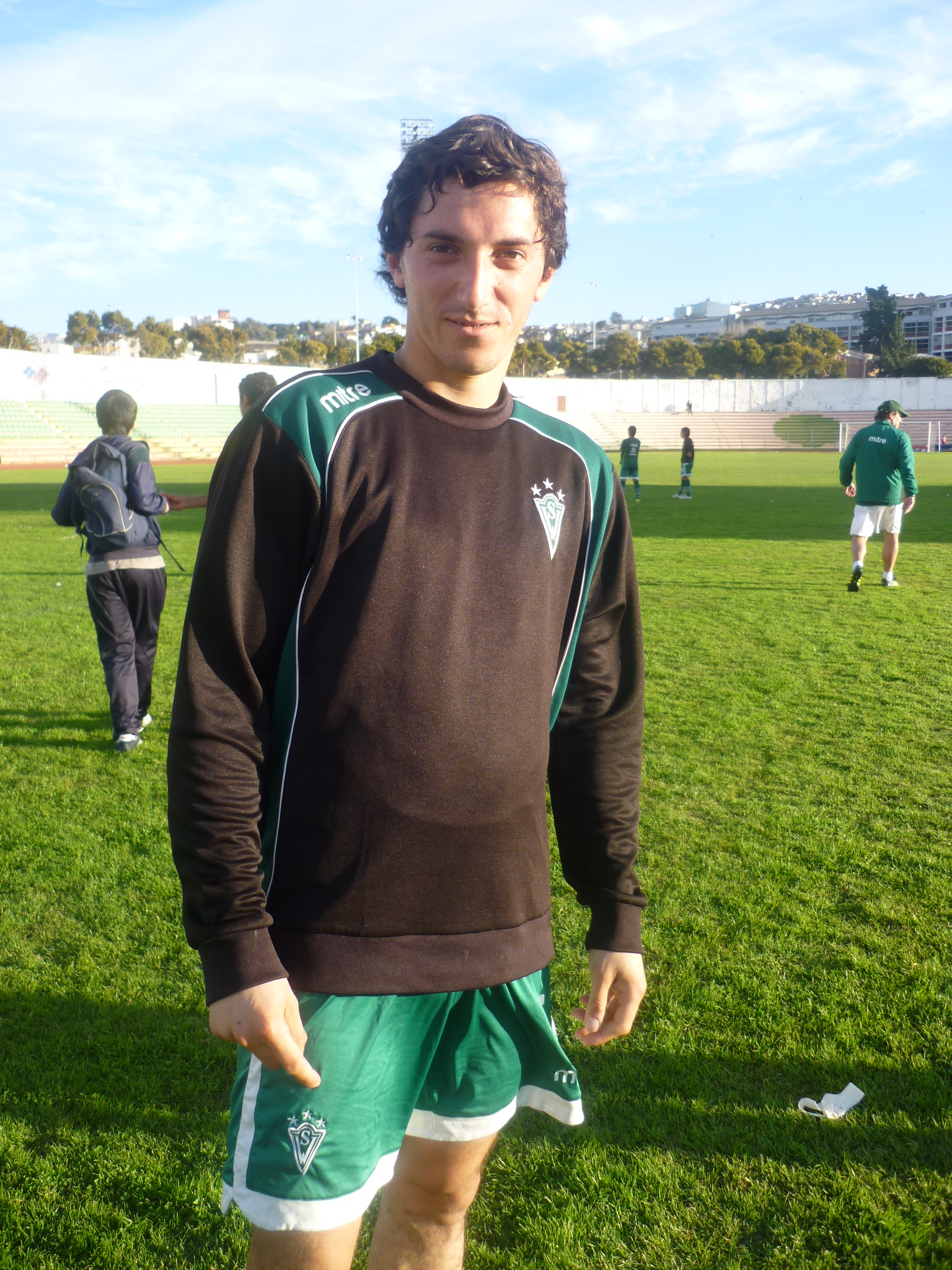 Fotografía de Sebastián Méndez, jugador de fútbol del Santiago Wanderers de la primera división de Chile.